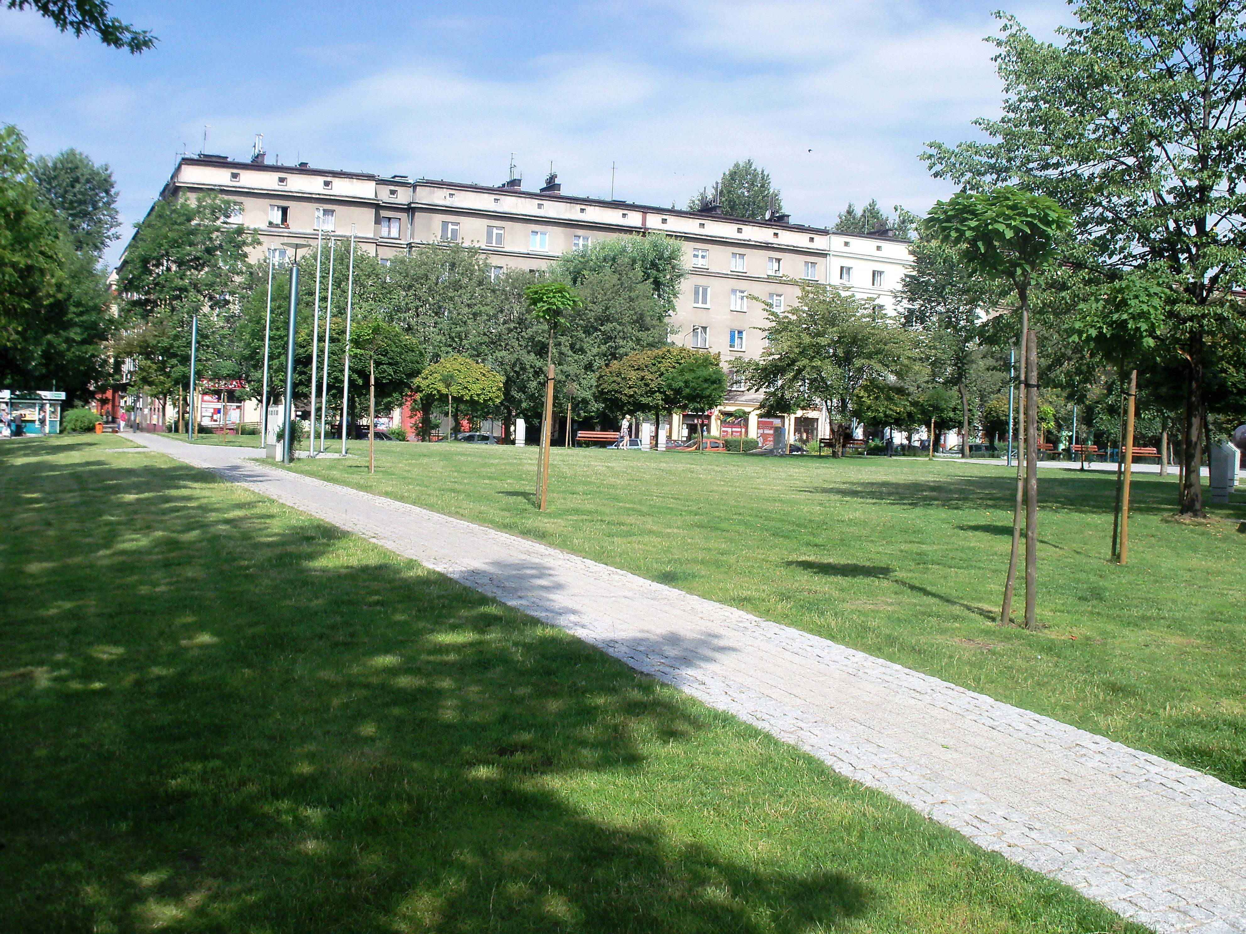 Plac Miast Partnerskich w Katowicach-Ligocie